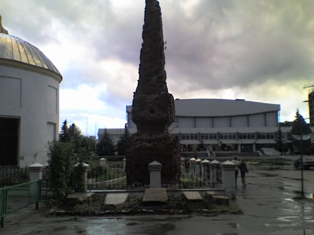 Входной пилон и могильные плиты Чугуновского кладбища